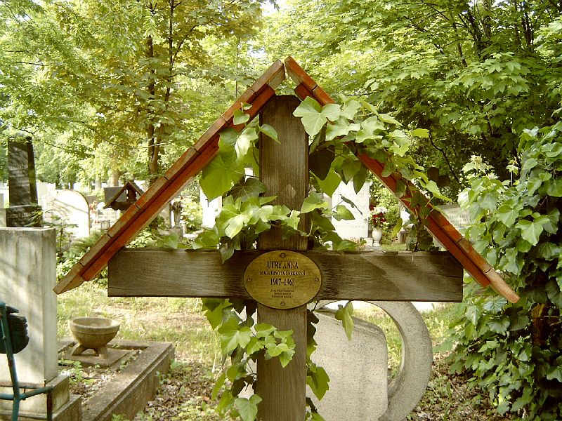 Utry Anna (Őregyháza, 1907. január 9. – Budapest, 1968. december 20.) magyarnóta- és népdalénekes sírja Budapesten. Új köztemető: 155-1-123/124